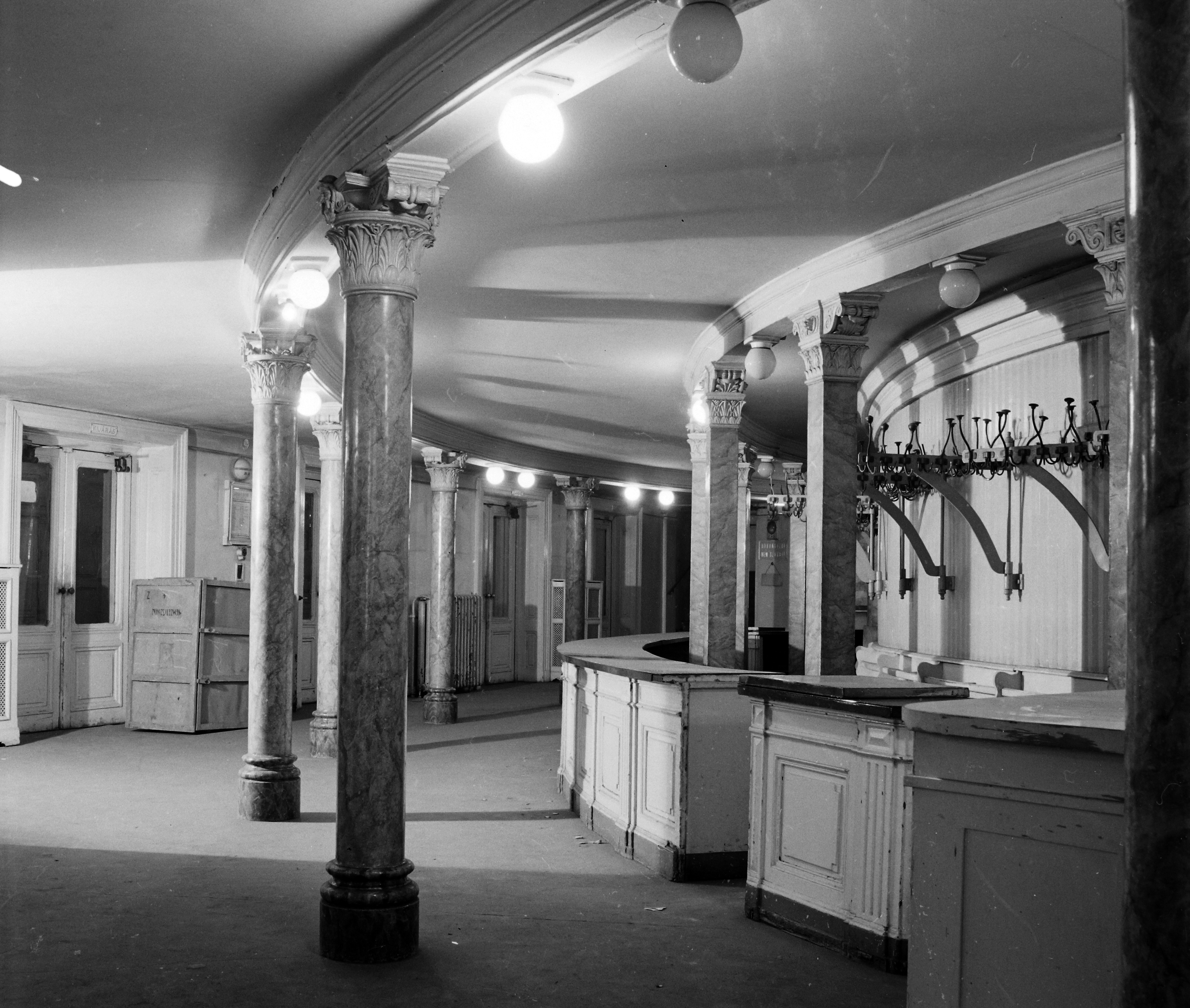 Blaha Lujza tér, Nemzeti Színház, ruhatár. Location: Hungary, Budapest VIII. Tags: art of theater, interior, cloakroom, Budapest Title: Blaha Lujza tér, Nemzeti Színház, ruhatár.